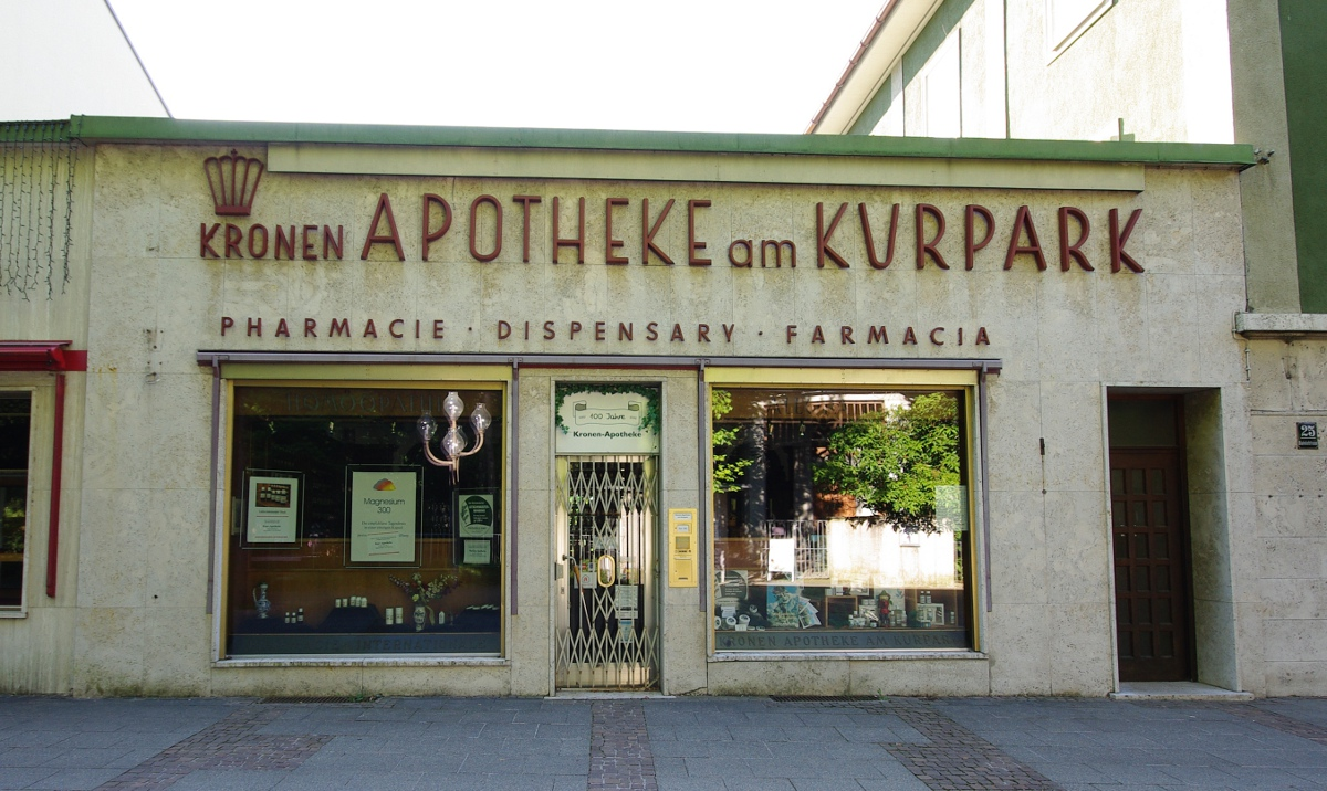 Kronen Apotheke am Kurpark, Bahnhofstr. 25, 83435 Bad ReichenhallThis is a photograph of an architectural monument.